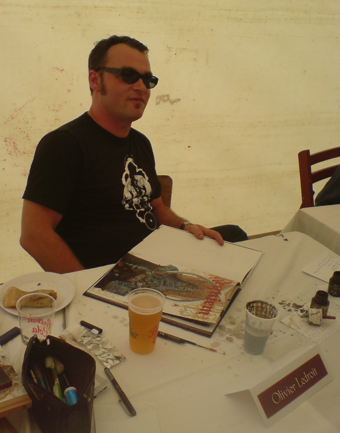 Olivier Ledroit at "Chateau de Comper" (Centre de l'Imaginaire Arthurien), for dedications